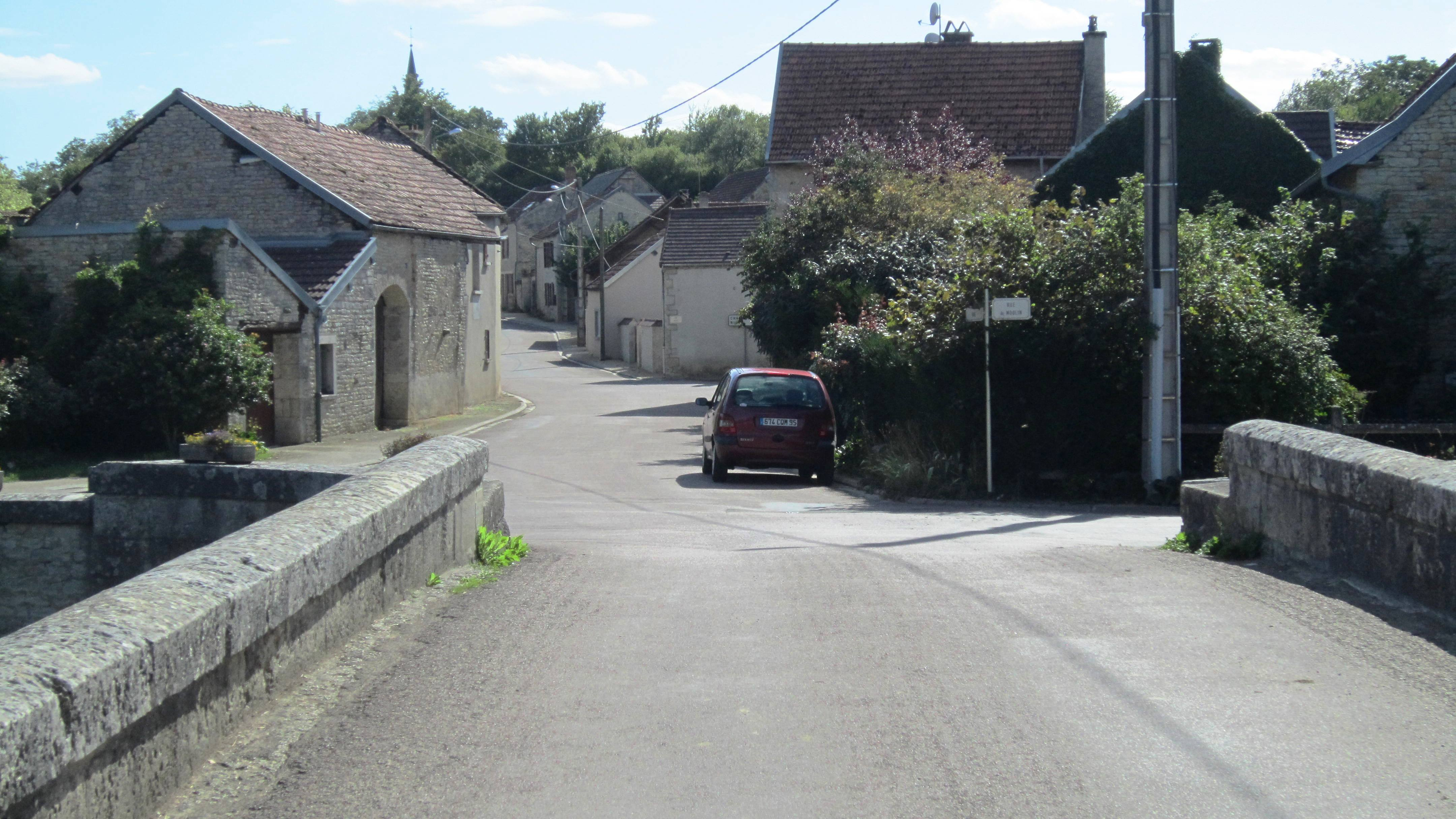 Griselles (Côte-d'Or)